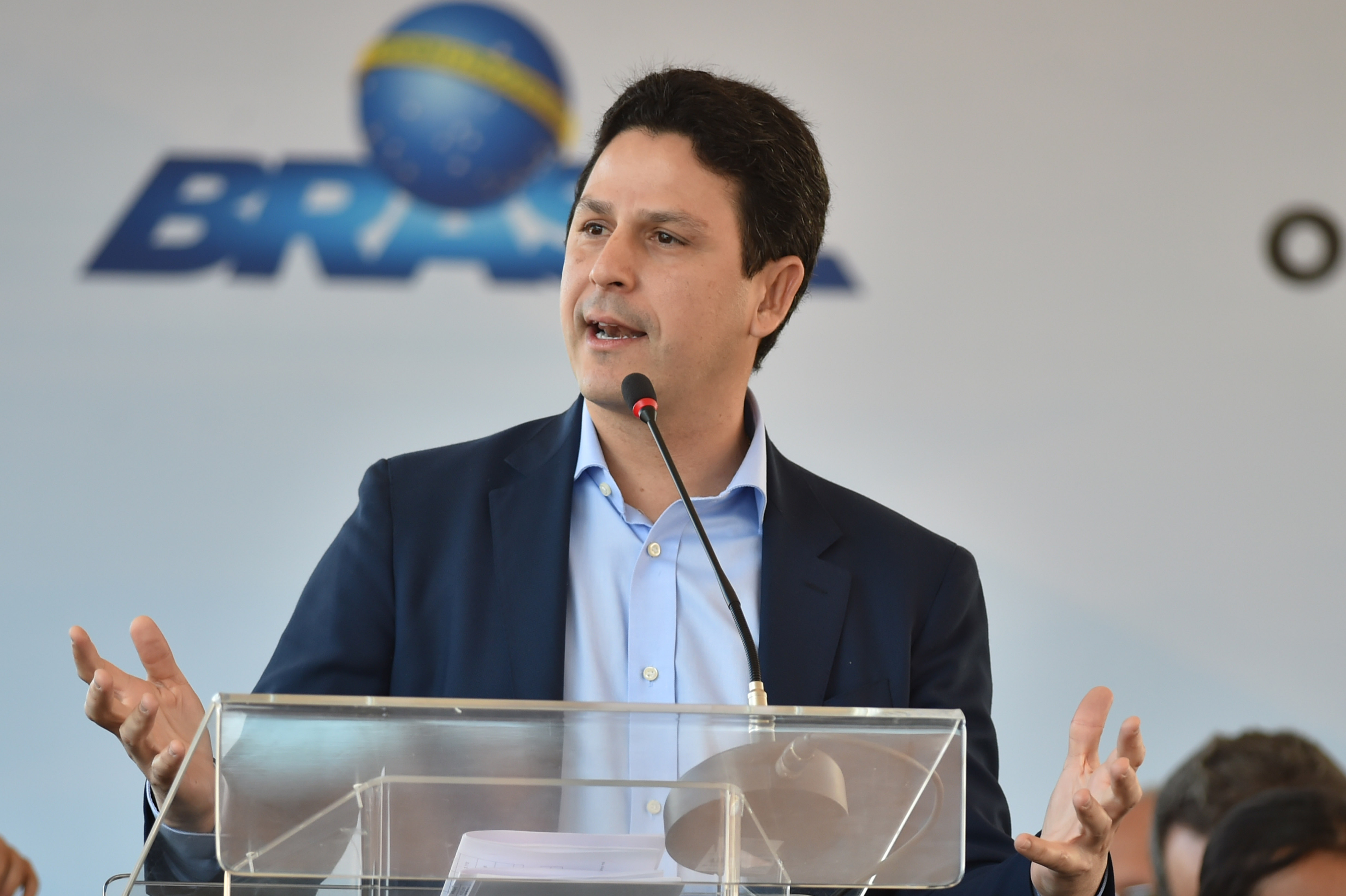 Paranoá, Brasília, DF, Brasil 1/7/2016 Foto: Andre Borges/Agência Brasília. Na manhã desta sexta-feira (1º), 2.304 apartamentos foram entregues a famílias no Paranoá Parque. Essa é a terceira e última leva no residencial. Com o evento de hoje, o número de unidades habitacionais entregues desde 2015 chegou a 4.384. Em todo o Distrito Federal, do ano passado para cá, foram 9.830 residências. Agora, nosso grande desafio é garantir a infraestrutura de escolas, creches, unidades básicas de saúde para atender bem essa população”, afirmou o governador de Brasília, Rodrigo Rollemberg, presente ao evento de entrega. Ministro das Cidades, Bruno Araújo.